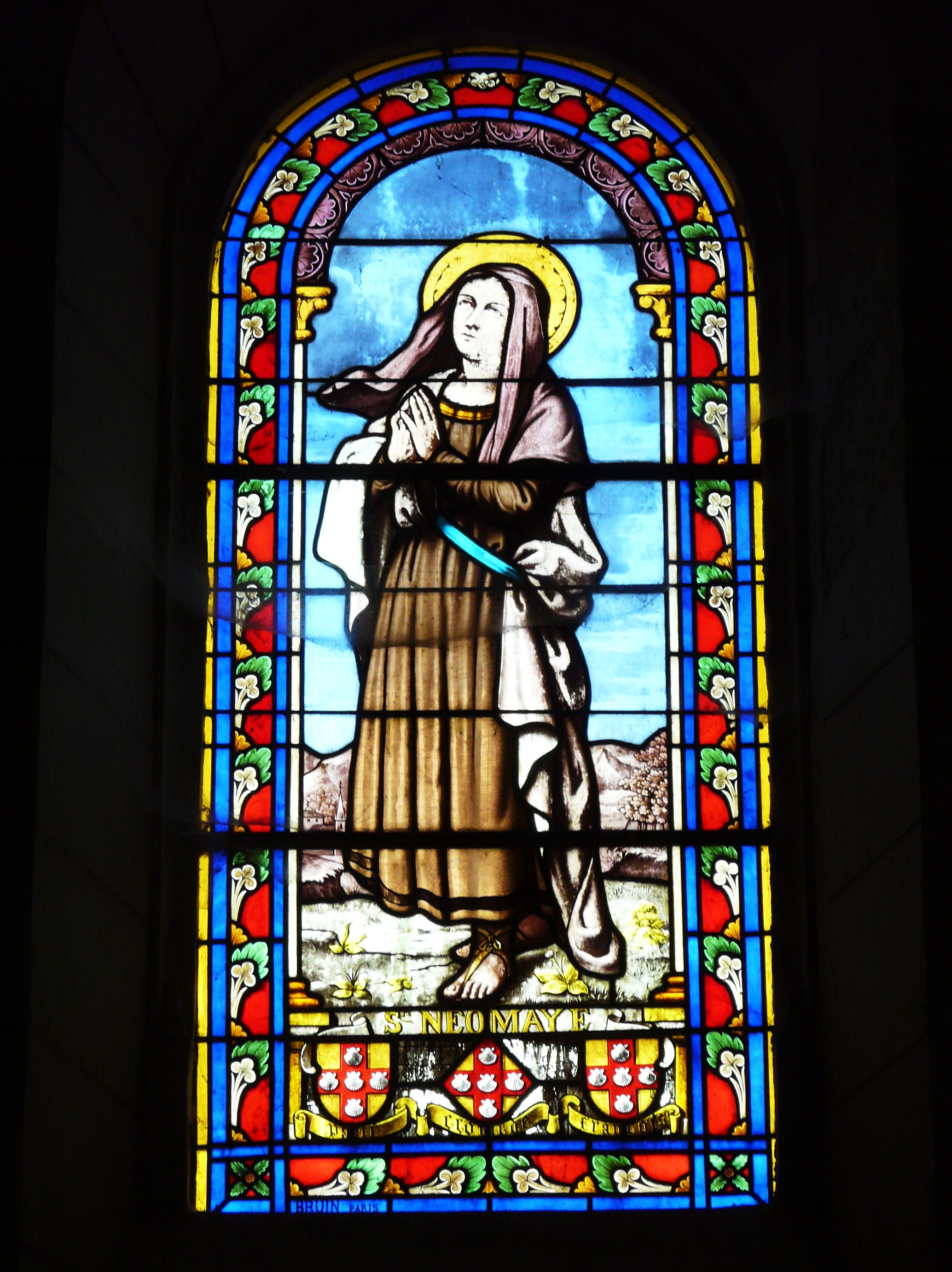 Vitrail de l'église Sainte-Catherine, Curçay-sur-Dive, Vienne, France. Représentation de sainte Néomaye.